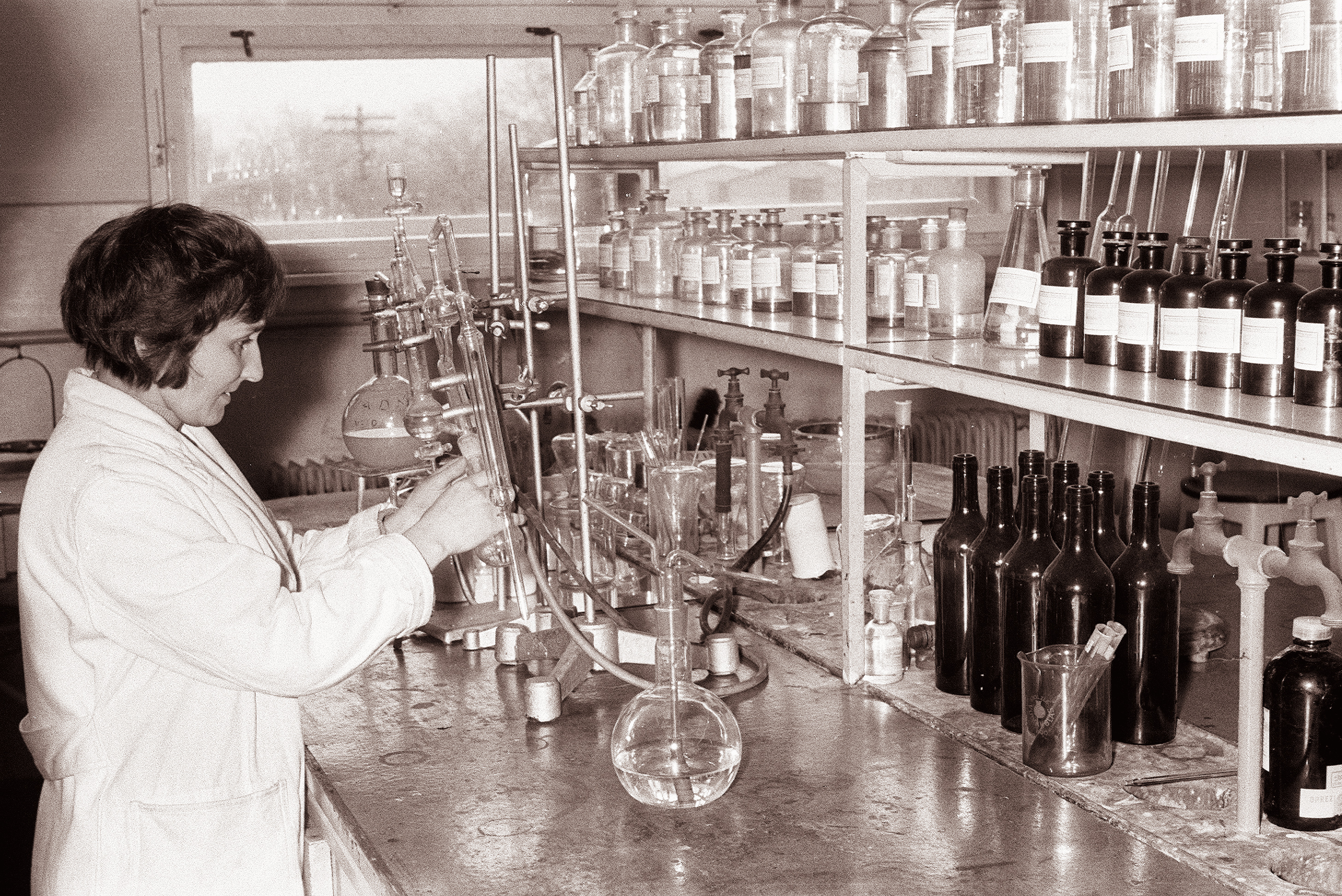 V analitskem laboratoriju Cinkarne Celje